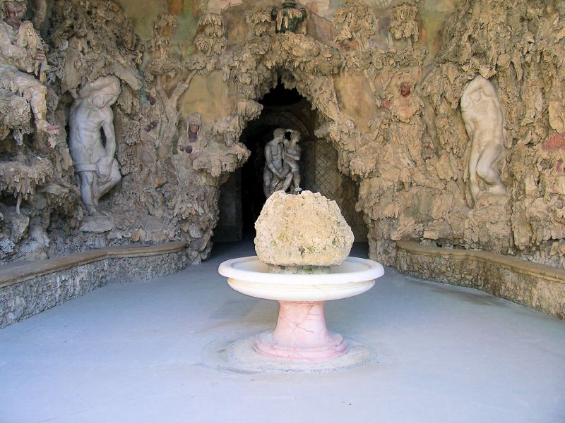 Giardino dei Boboli, Firenze, Italy.